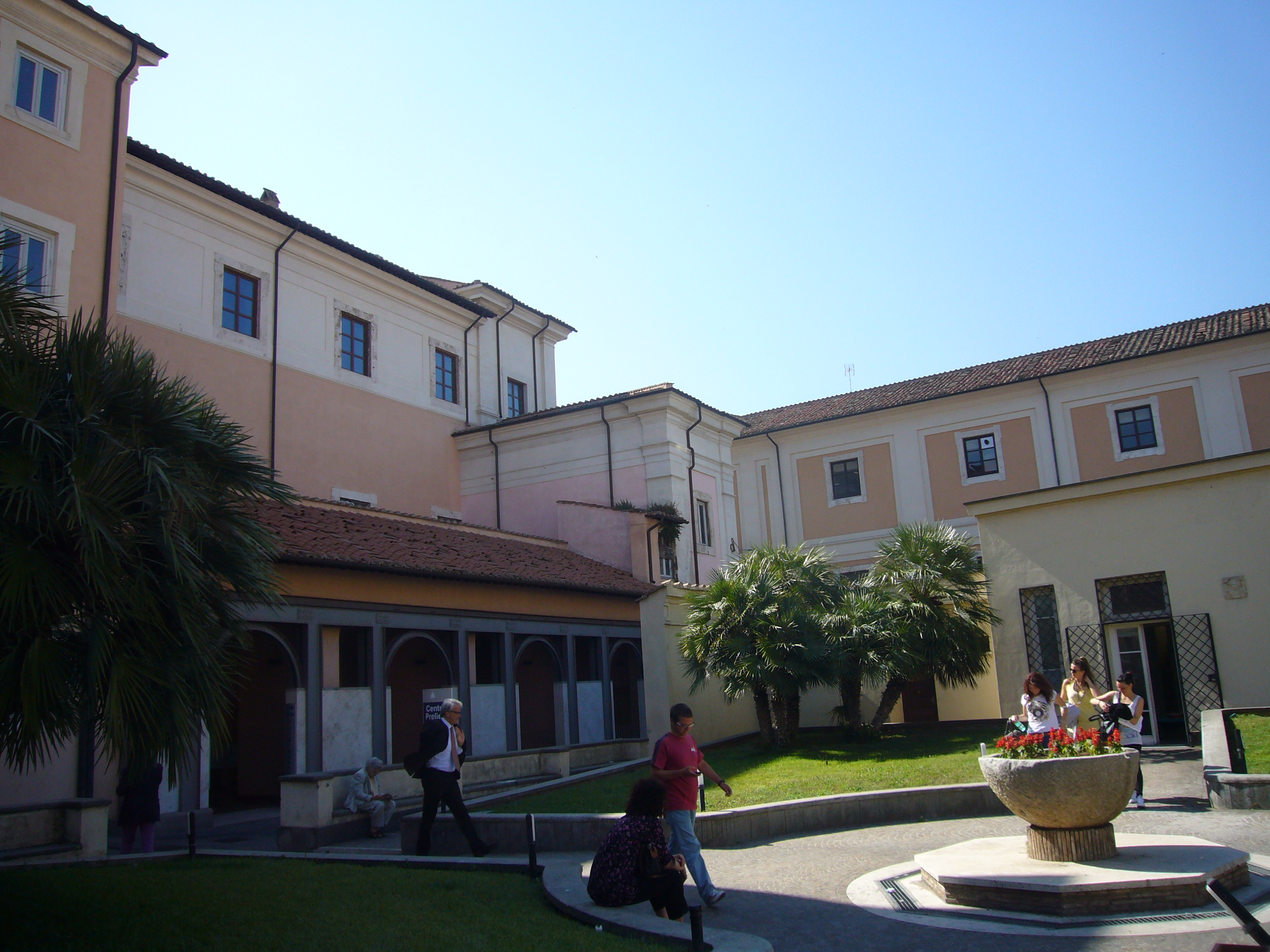 Roma, Ospedale delle donne a s. Giovanni. see filename